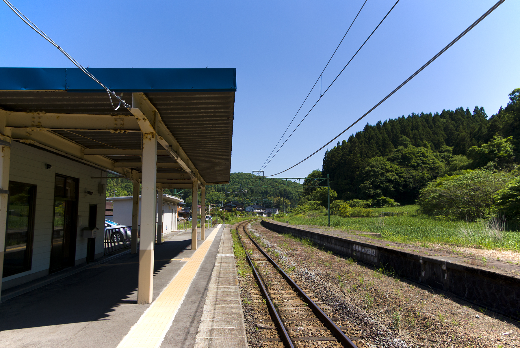 東日本旅客鉄道株式会社越後線石地駅